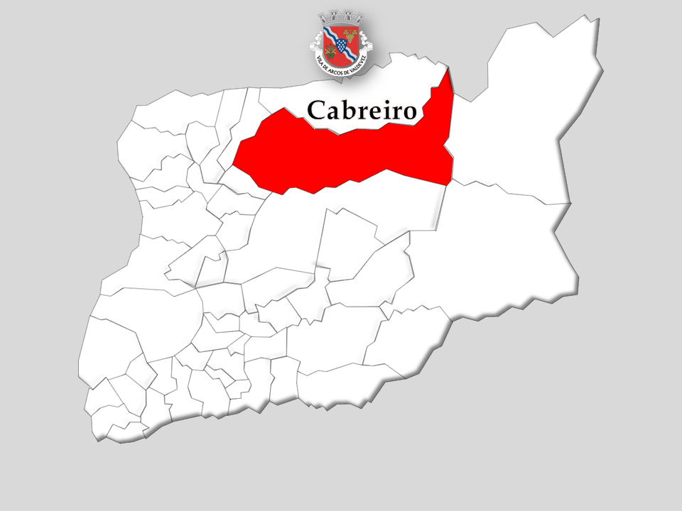 Censoa 1864/2011